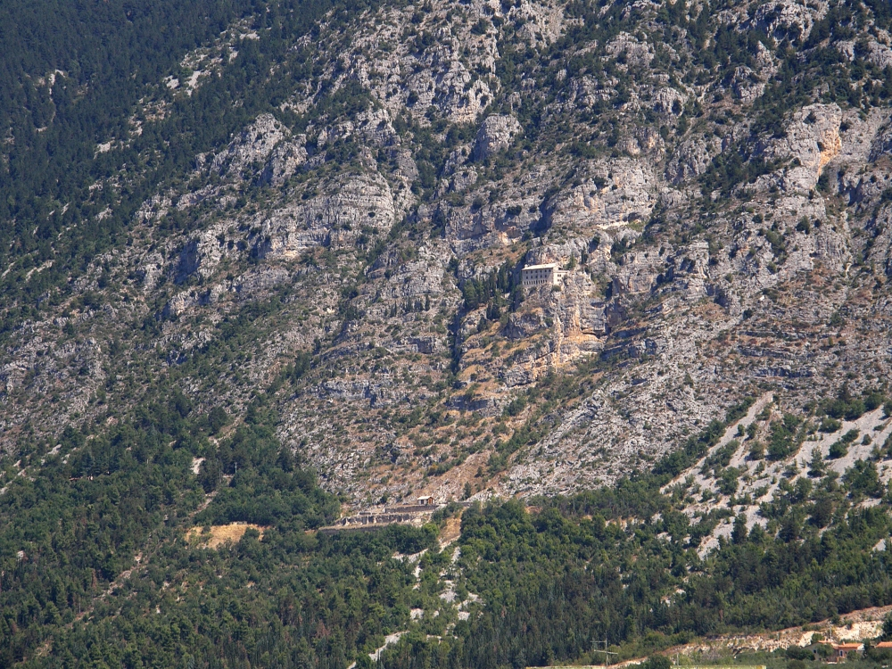 EREMO CELESTINO V in Sulmona